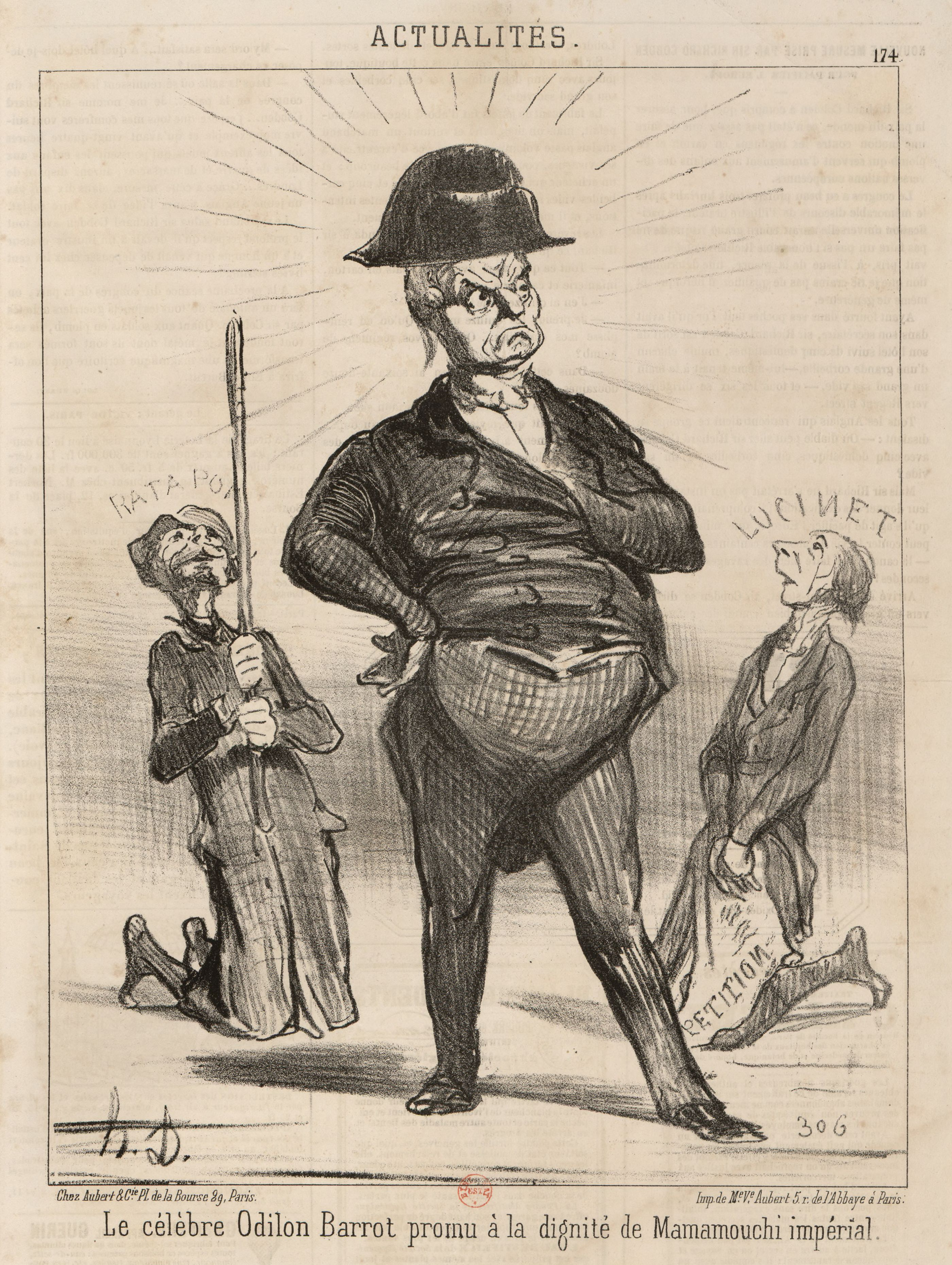 Portrait charge d'Odilon Barrot (1791-1873), homme politique français